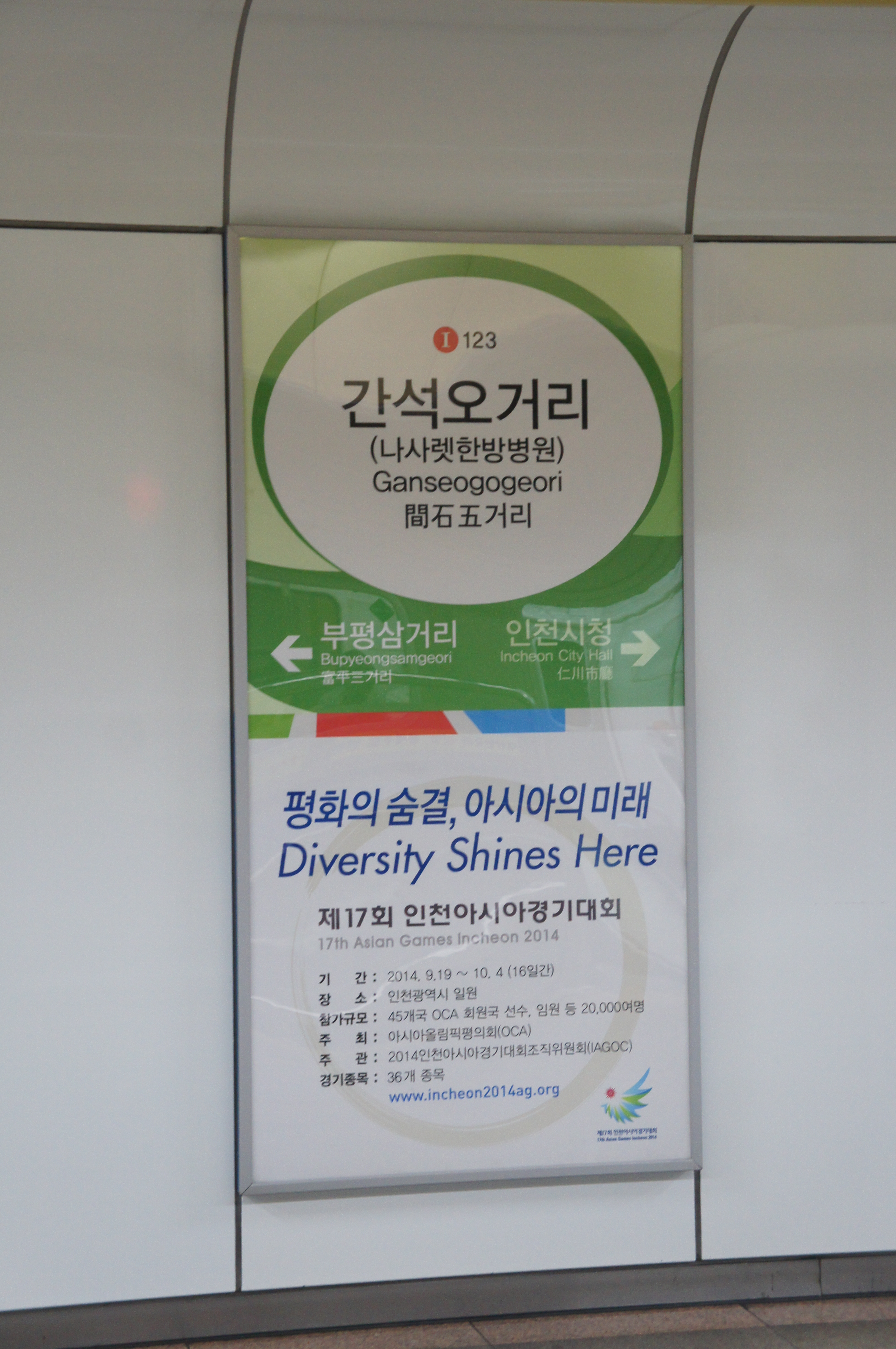 간석오거리역 역명판